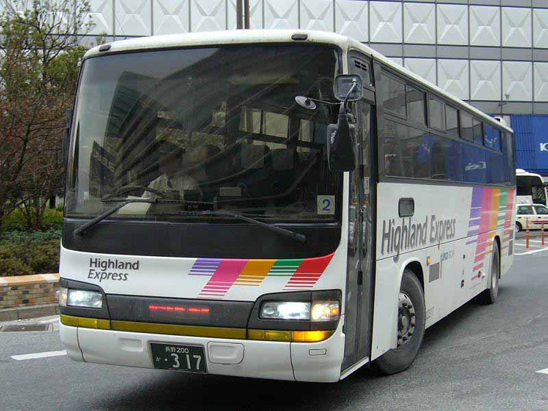 新宿駅西口にて撮影 登録番号：長野200か・317 川中島バス所属所属 東京 - 長野線用 日野・セレガ KL-RU4FSEA